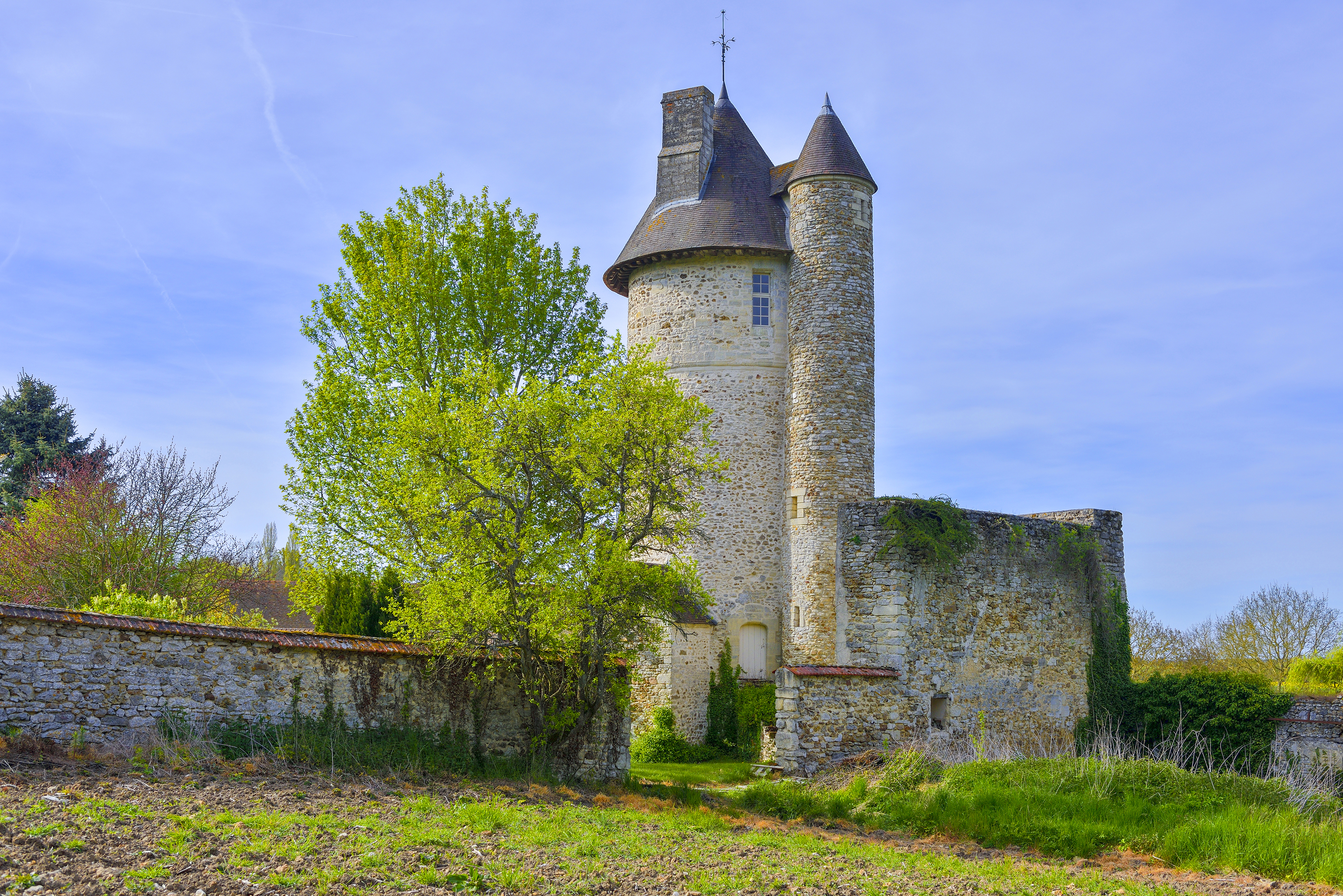 La tour de Méré, commune de Chaussy, Val-d'Oise, France.